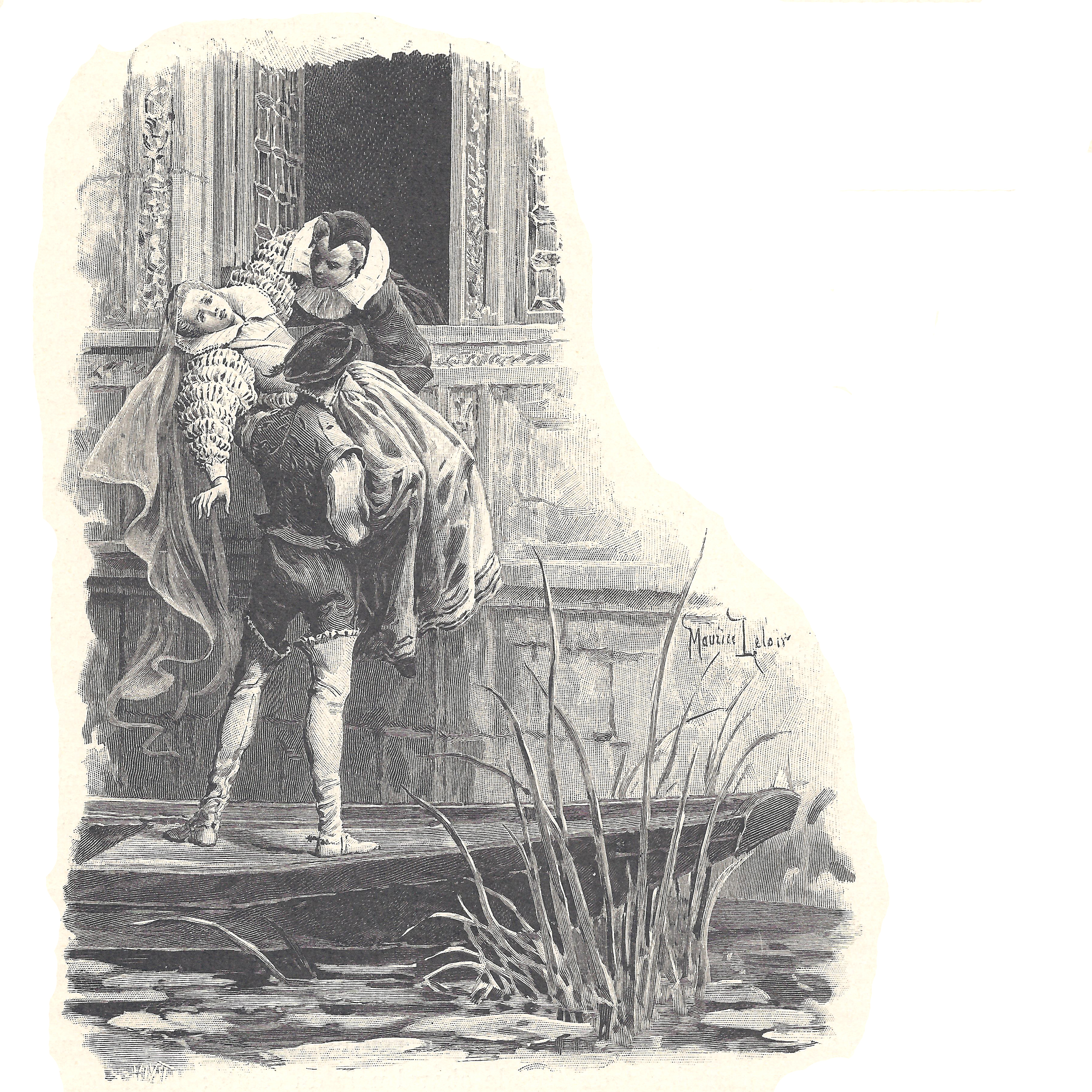 composition de Maurice Leloir et gravure sur bois de Jules Huyot se trouvant p. 169 : Gertrude ma prit dans ses bras et ma remit dans ceux du comte.